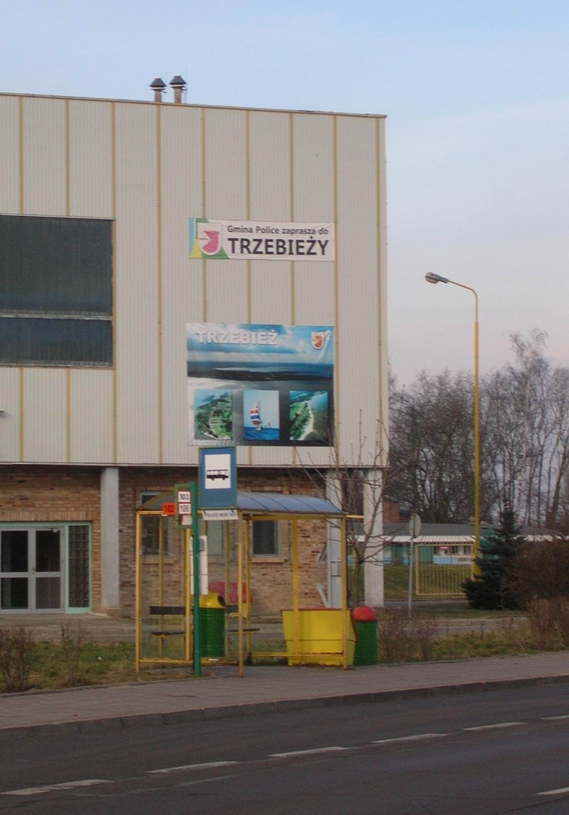 Bus stop in Police, a town in Pomerania, Poland / Przystanek komunikacji miejskiej w Policach